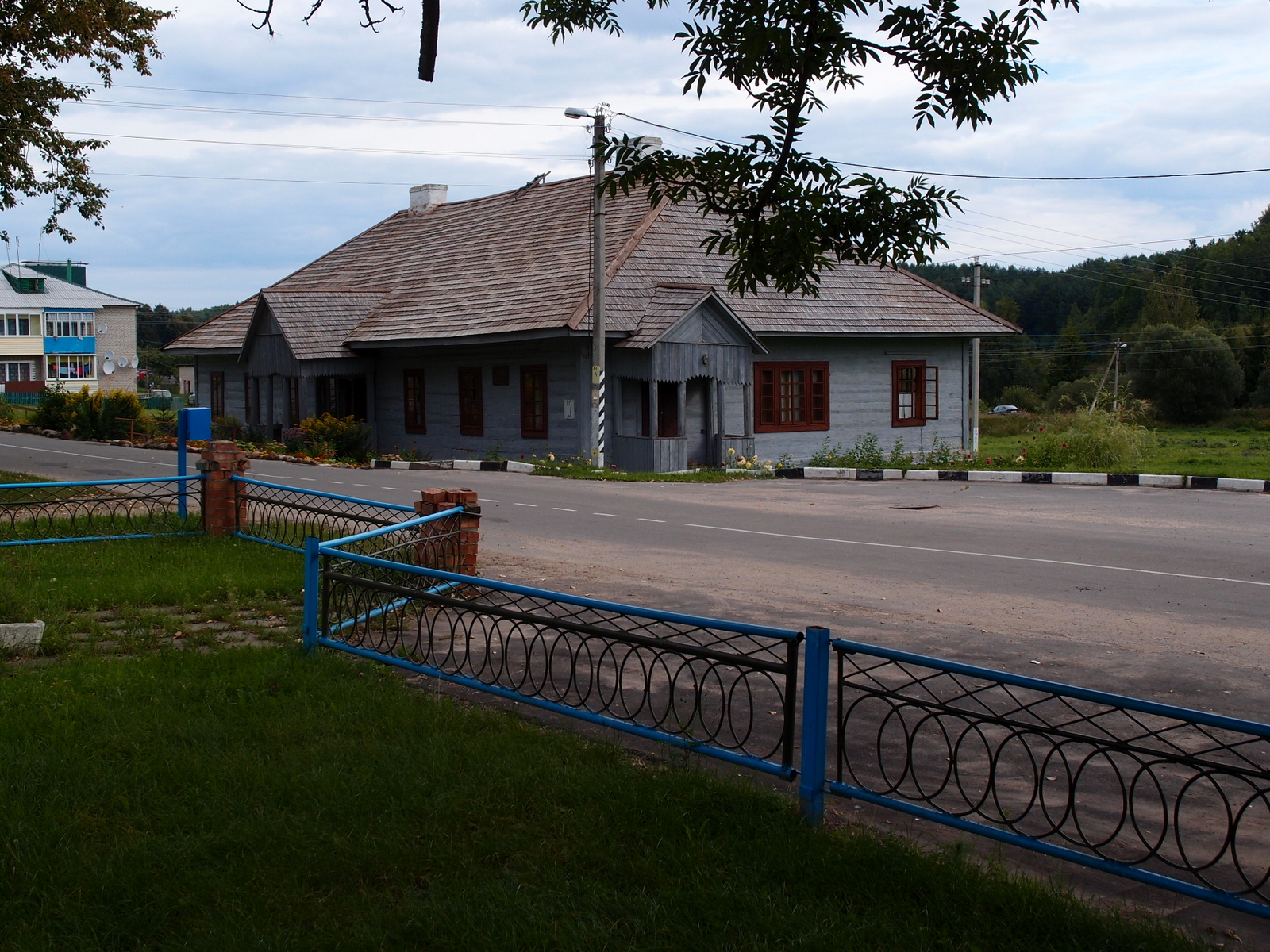 Jachimoŭščyna village